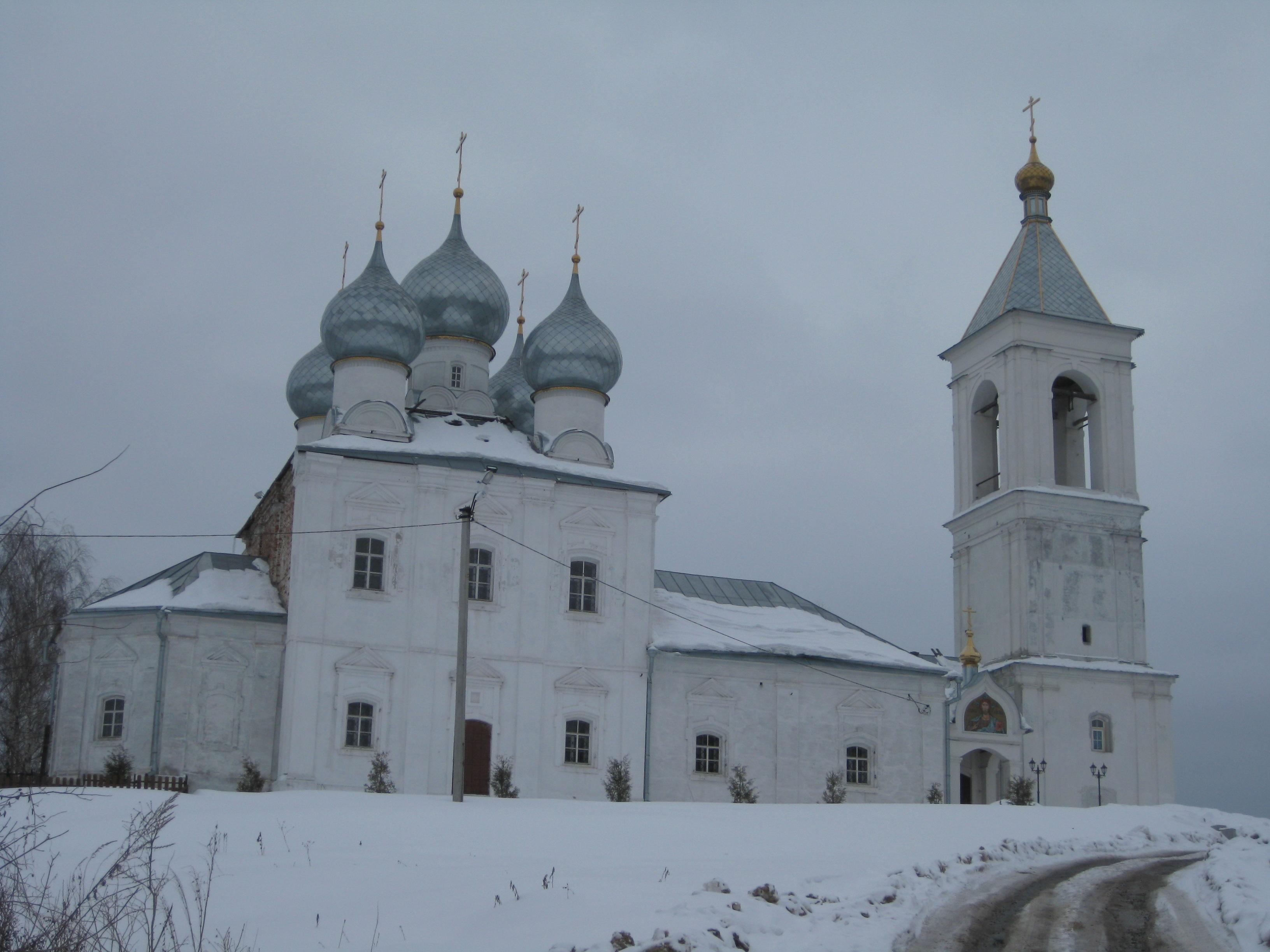 Церковь Никиты Мученика (Москва и Московская область, Раменское, село Софьино)